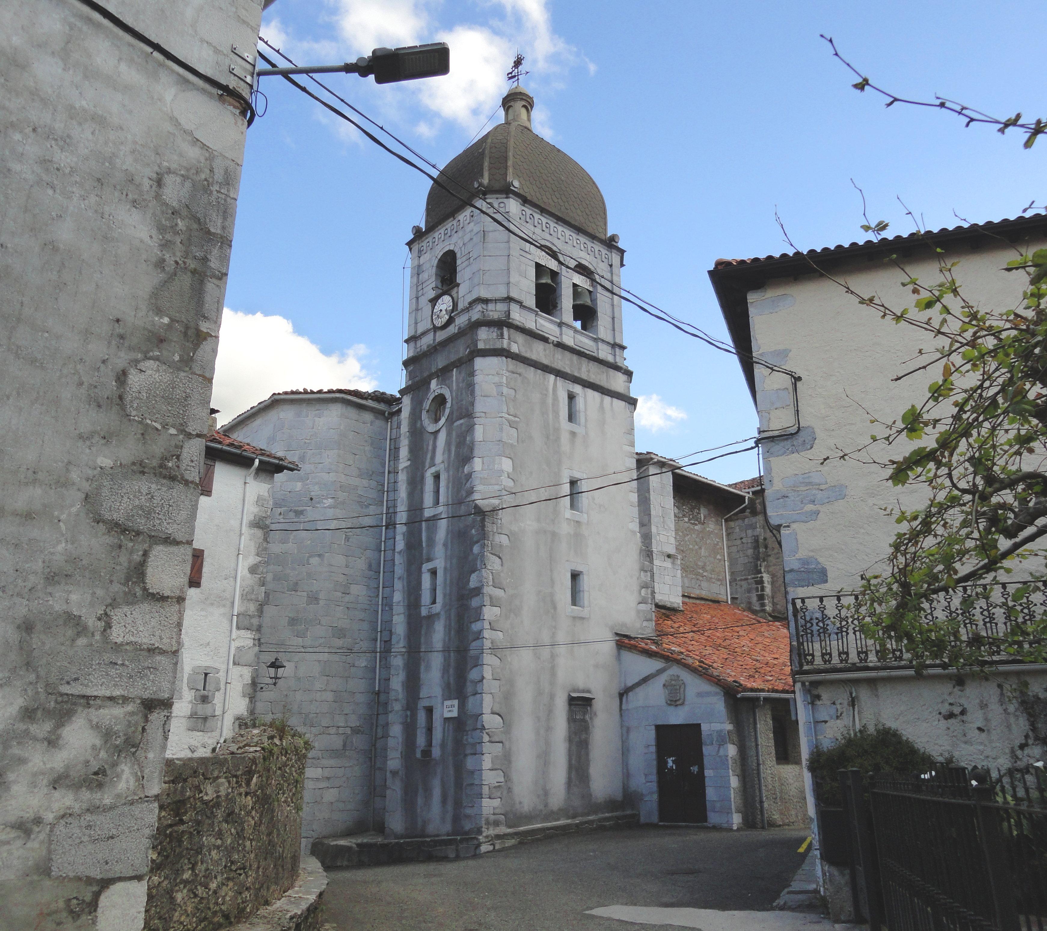 Asuncion eliza- Arantza